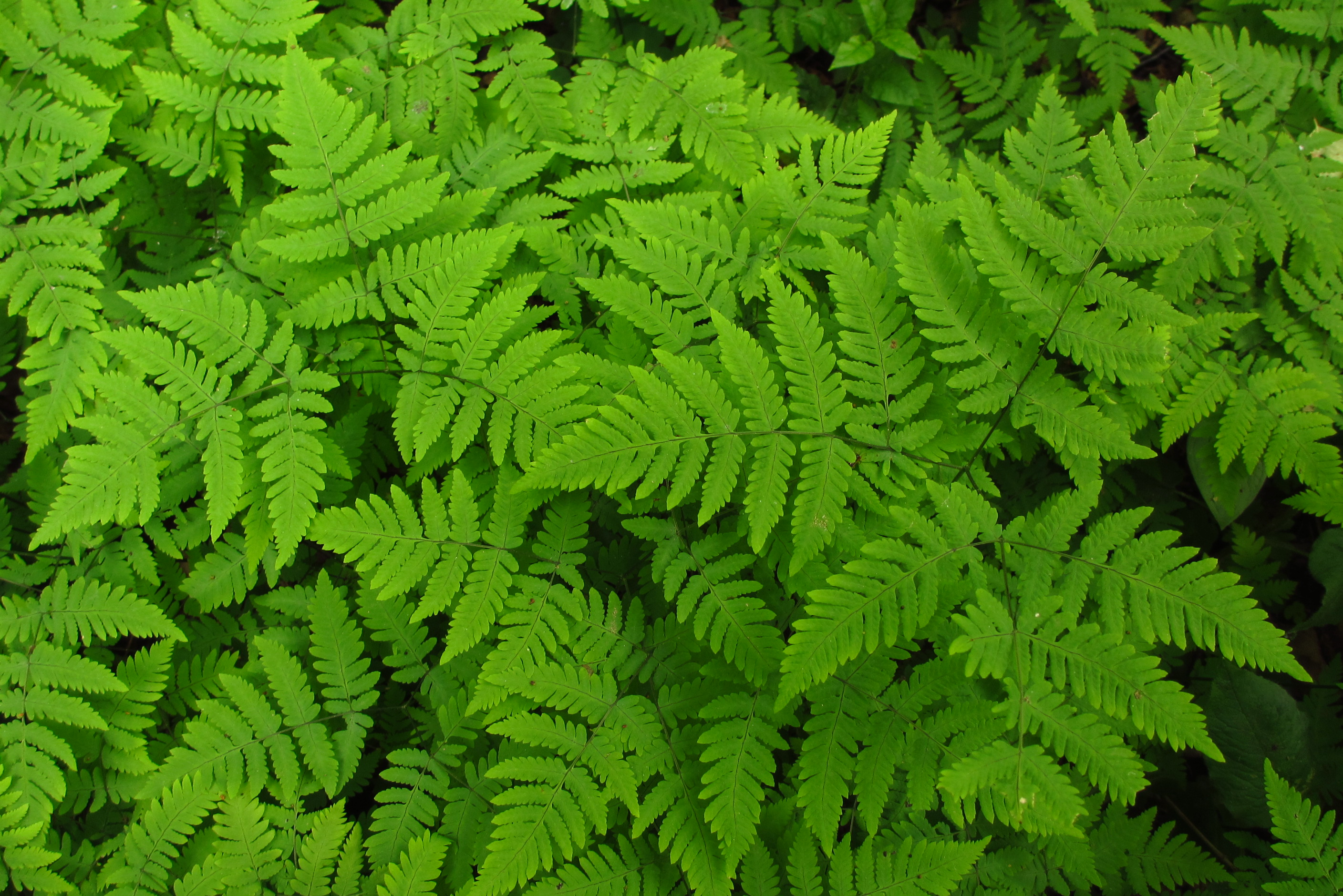 Harilik kolmissõnajalg Kurtna MKAl